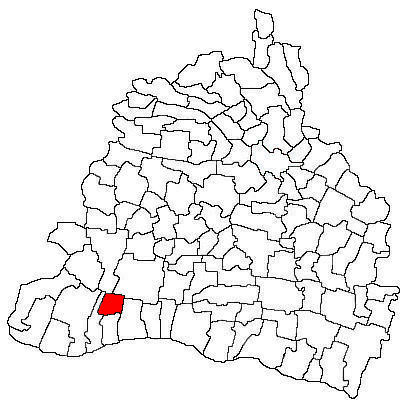 Amplasarea în cadrul județului.